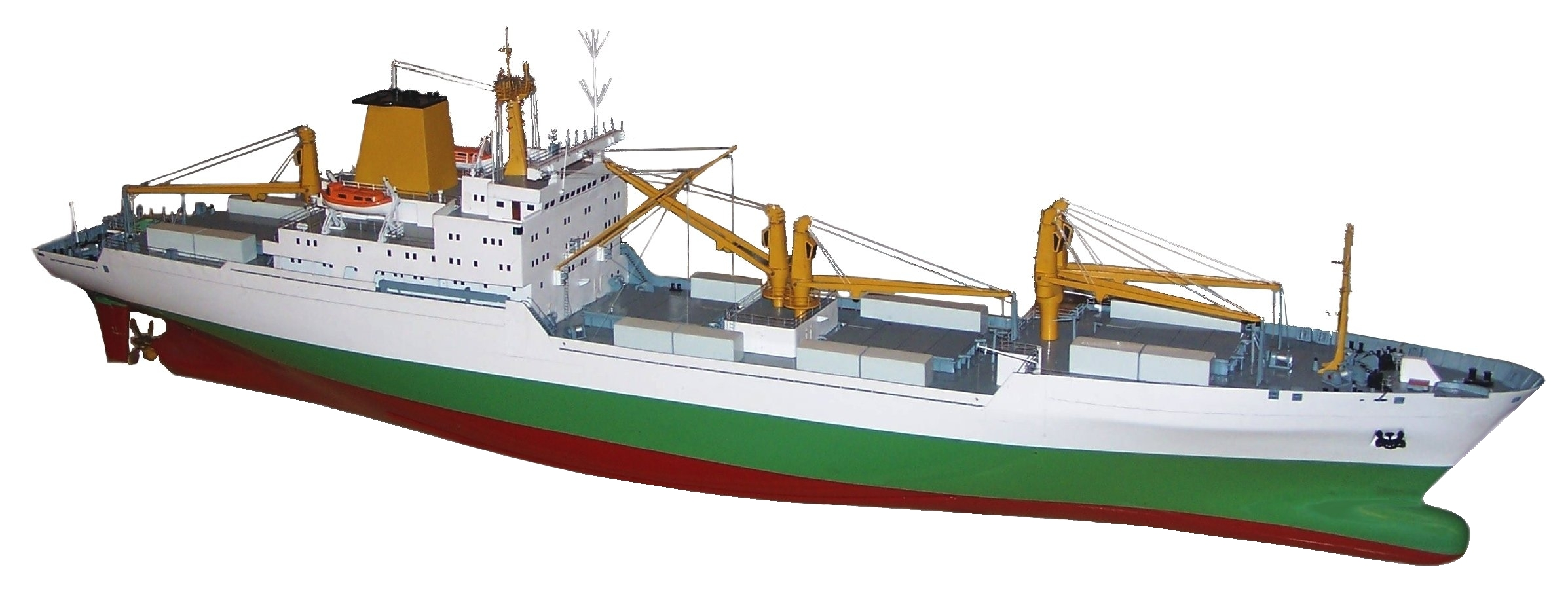 Model chlodniowca typu B-360. Dane techniczne: pojemność 10524 BRT, nośność 10679 ton. Wymiary: dł. 152,41m, szer. 22,61m, zan 9,45m. Napęd: 1 silnk spalinowy typu "Sulzer" o mocy 14780 KM, prędkość 24,0 w. Zabierał 122 kontenery. Stocznia Gdańska wybudowała w 1981 r. dla armatora szwajcarskiego 2 jednostki tego typu. Otrzymały one nazwy: "Albula" i "Bernina". Skala 1:100. Centralne Muzeum Morskie w Gdańsku.